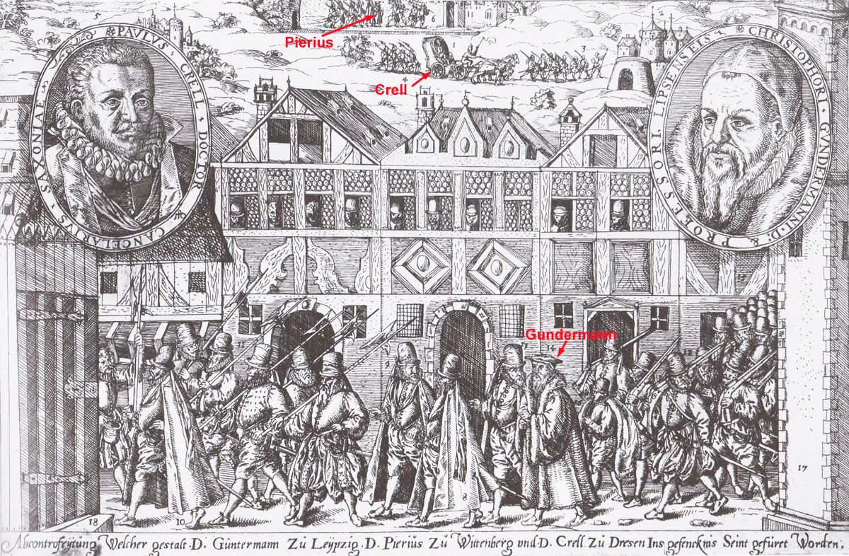 Kupferstich aus der Flugschrift von Christoph Gundermann aus dem Jahr 1592 Er zeigt drei Ereignisse zu unterschiedlichen Zeiten an unterschiedlichen Orten: Festnahme Gundermanns (Hauptbild unten), Transport des festgenommenen Krell in der Kutsche von Dresden nach der Festung Königstein (darüber) und die Verbringung Pierius´ ins Gefängnis im Wittenberger Schloss (ganz oben). (Gemäß Leipziger Blätter, Nr. 70, S. 5) Originaltext: Eigentliche Beschreibung, Welcher gestalt D. Paulus Krell, Churfürstlicher Cantzler zu Dresen [sic], vnd D. Christophorus Gunderman Prediger zu Leipzig, vn[d] D. Vrbanus Pierius Prediger und Superintendendens zu Wittenberg, nach Hertzog Christiani Churfürsten, etc. absterben gefänglich eingezogen worden. Alles in einem künstlichen Kupfferstück für Augen gebildet, vnd mit Ziffern erklärt. Getruckt ohne Approbation D. Christoph. Gunderman, Pfarrherr zu S. Thomas in Leipzig. [Leipzig] 1592.